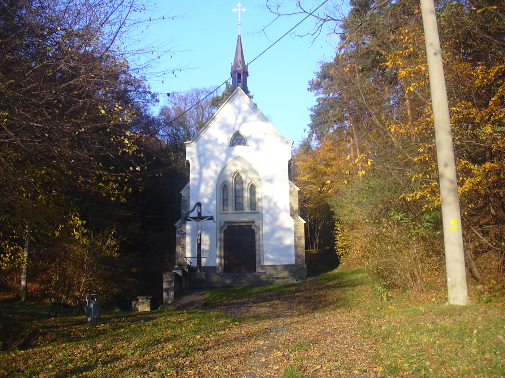 Kaple Strachotínka Hamiltony (Vyškov- Czech republic)